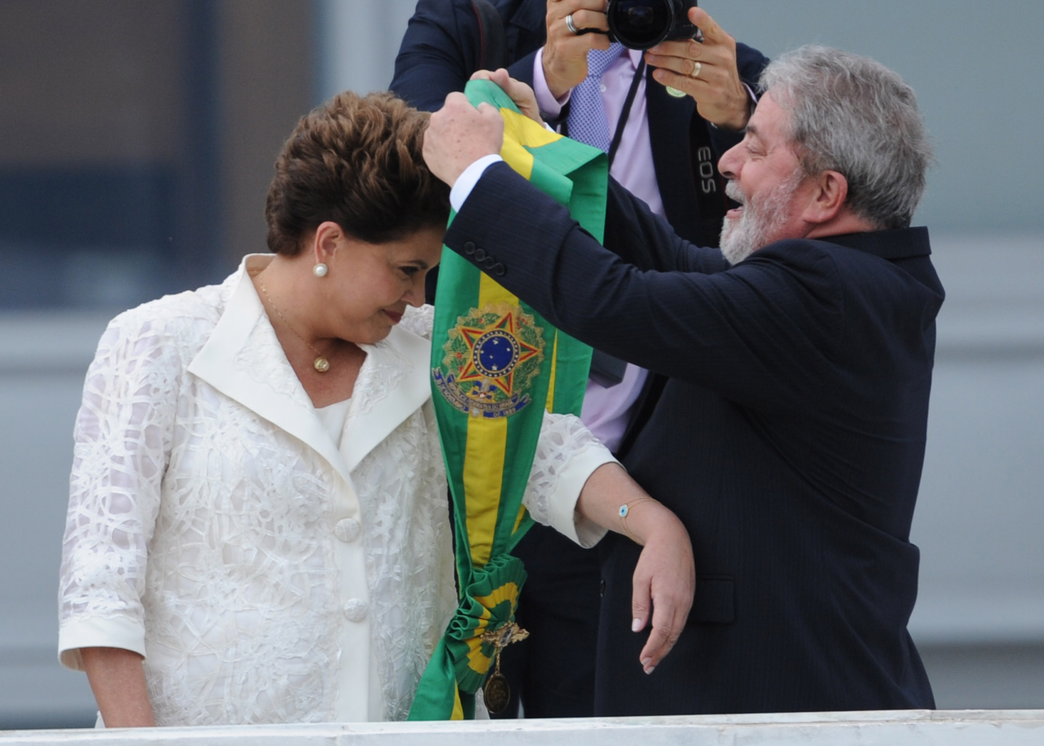 A presidenta Dilma Rousseff recebe a faixa presidencial de Lula, no parlatório do Palácio do Planalto. Brasília, 1º de janeiro de 2011.